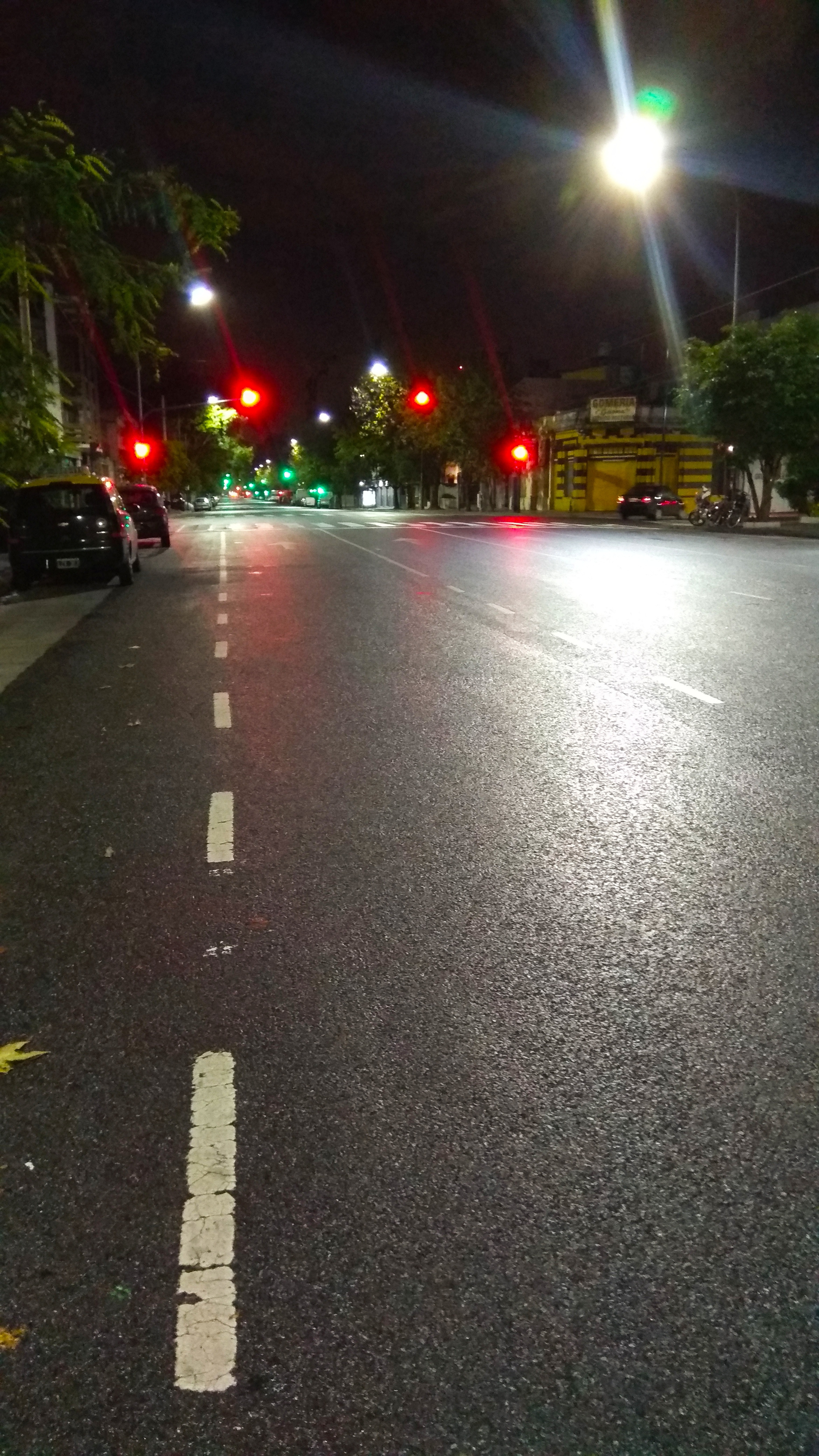 Vista nocturna de la avenida Gaona (Buenos Aires) hacia el oeste en Floresta